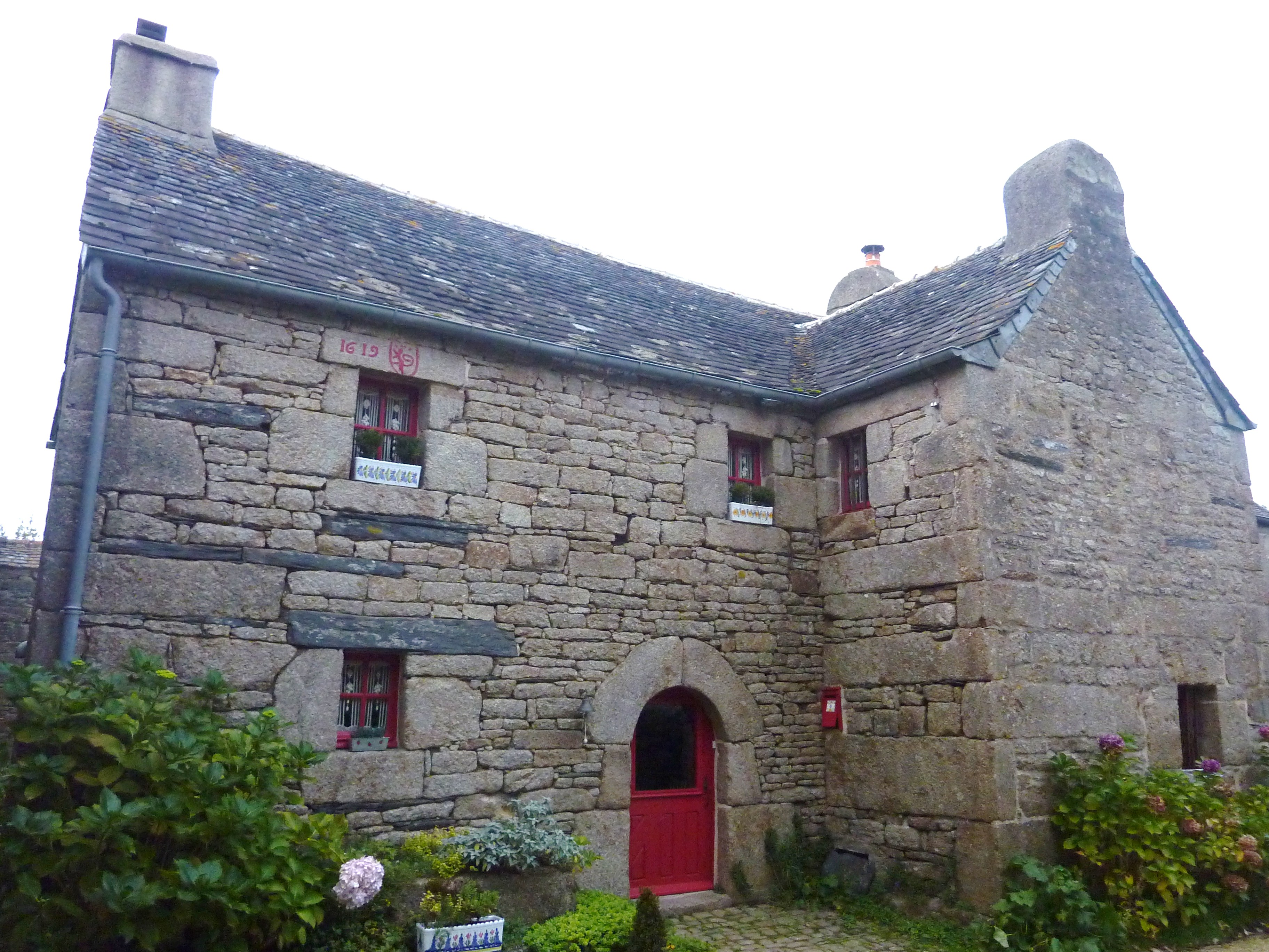 Plounéour-Ménez : maison de julod (riche marchand de toile) à étage et à avancée , datée de 1619 dans le bourg. Elle porte les armes des seigneurs de Coatlosquet. L'avancée date de 1837, il s'agit donc d'un rajout. En schiste et granite.